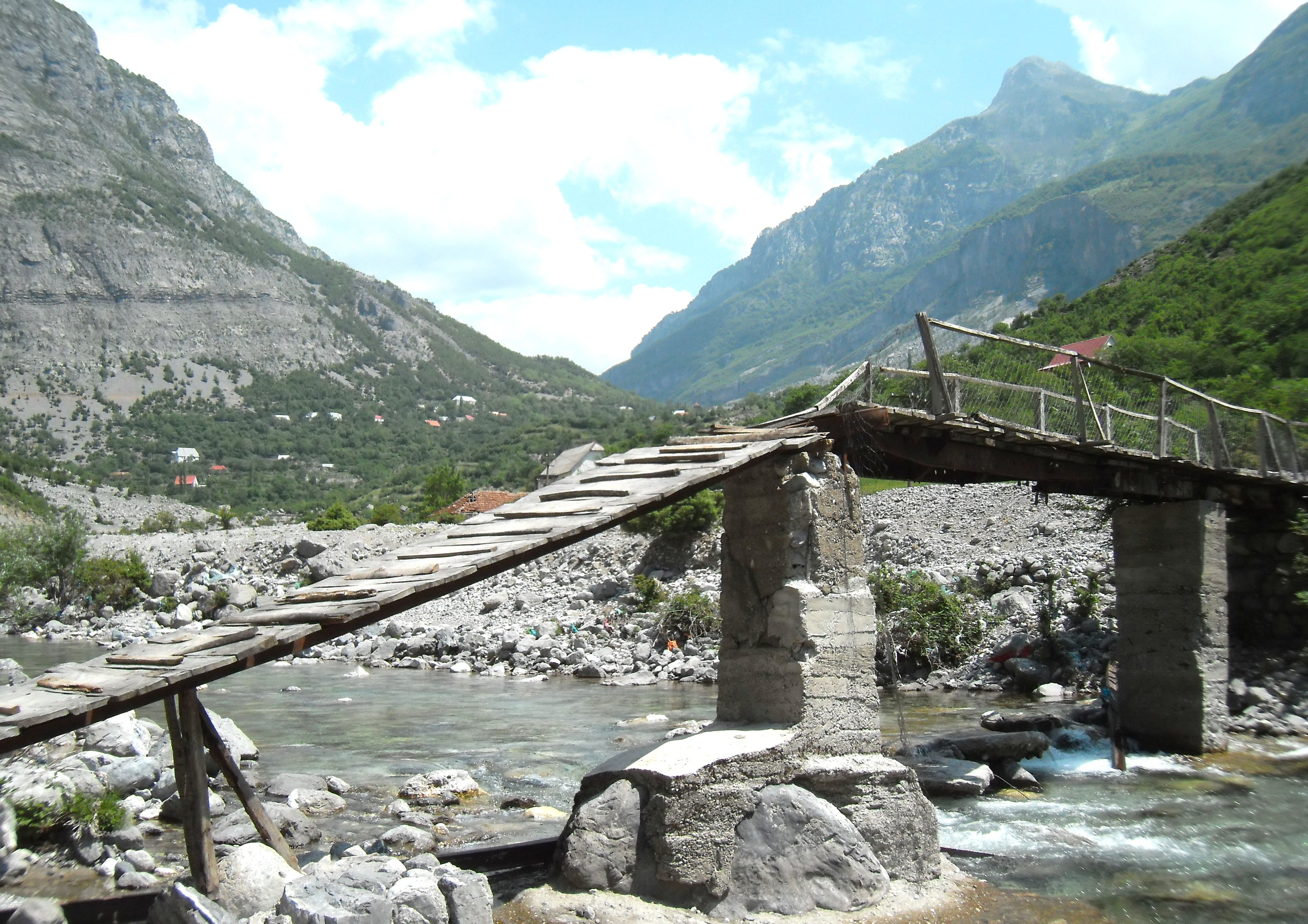 Fußgängerbrücke in Selce, Albanien